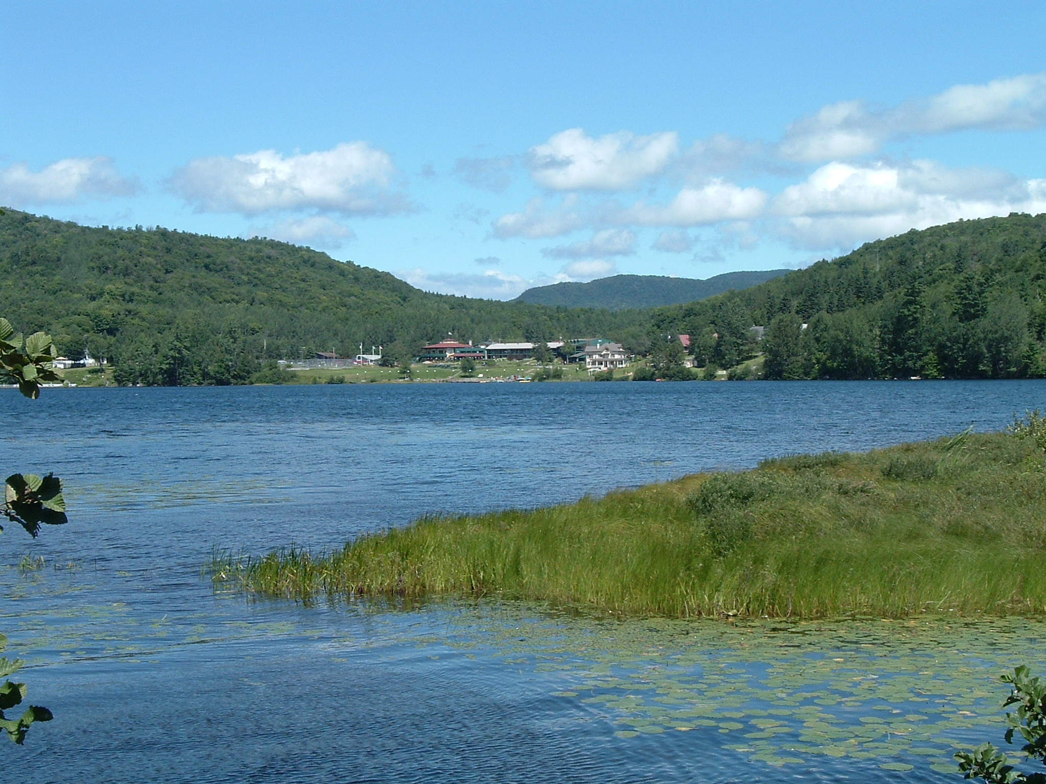 Vue sur le lac Delage, au coeur de la ville de Lac-Delage